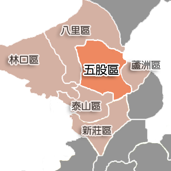 五股區相對位置。